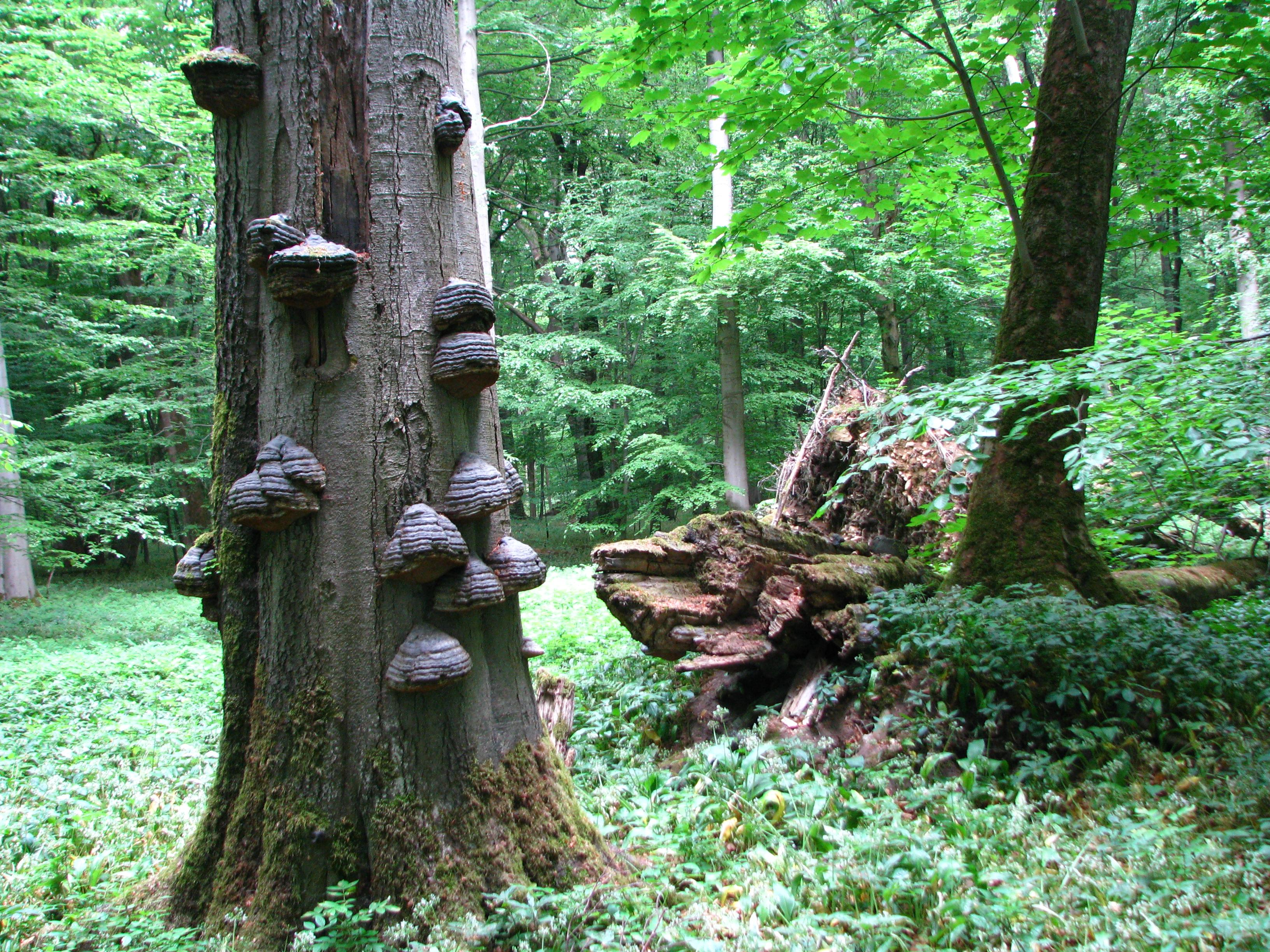 Totholz im Weberstedter Holz (Nationalpark Hainich)